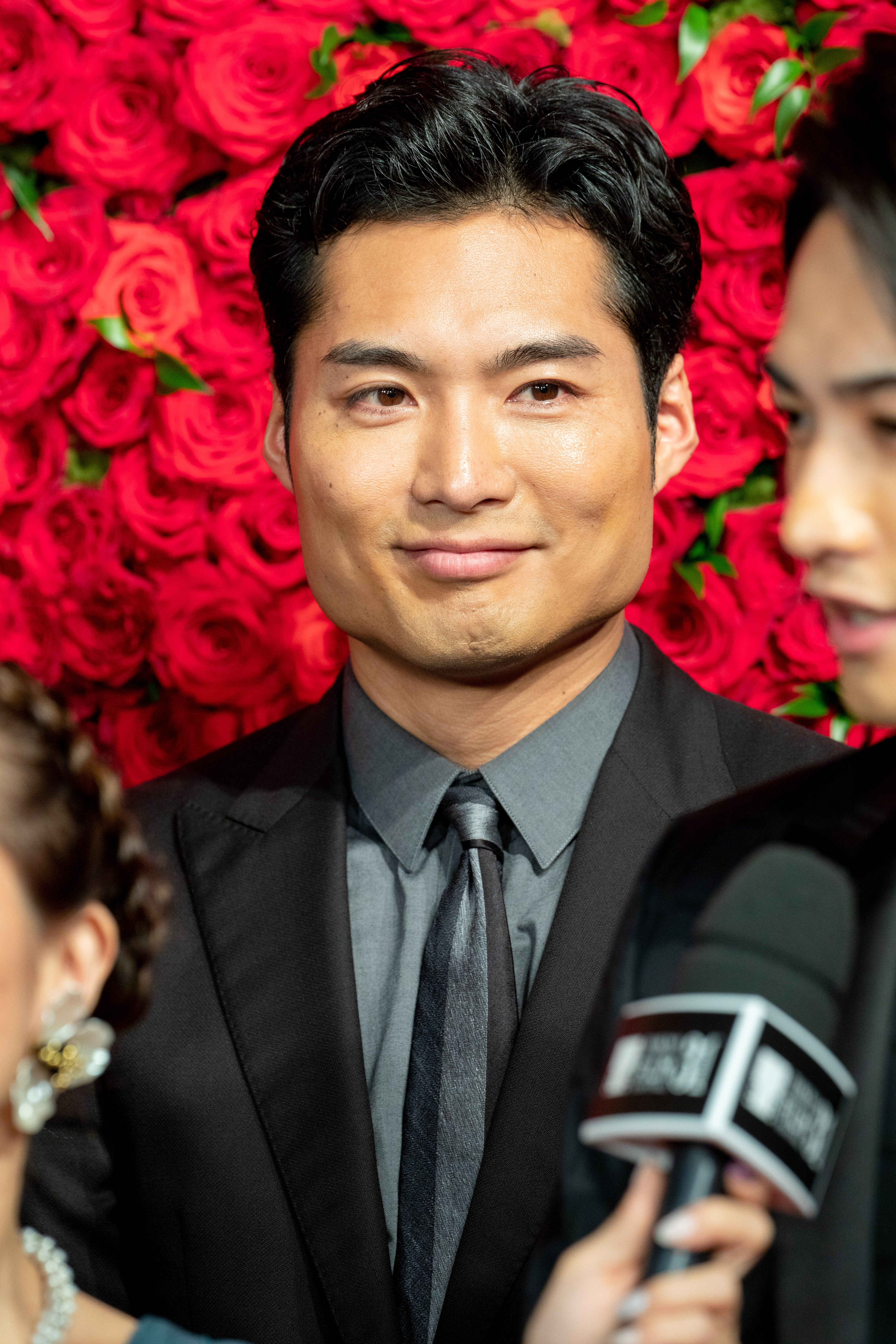 第30回 東京国際映画祭 オープニングセレモニー 八木将康 (jam)